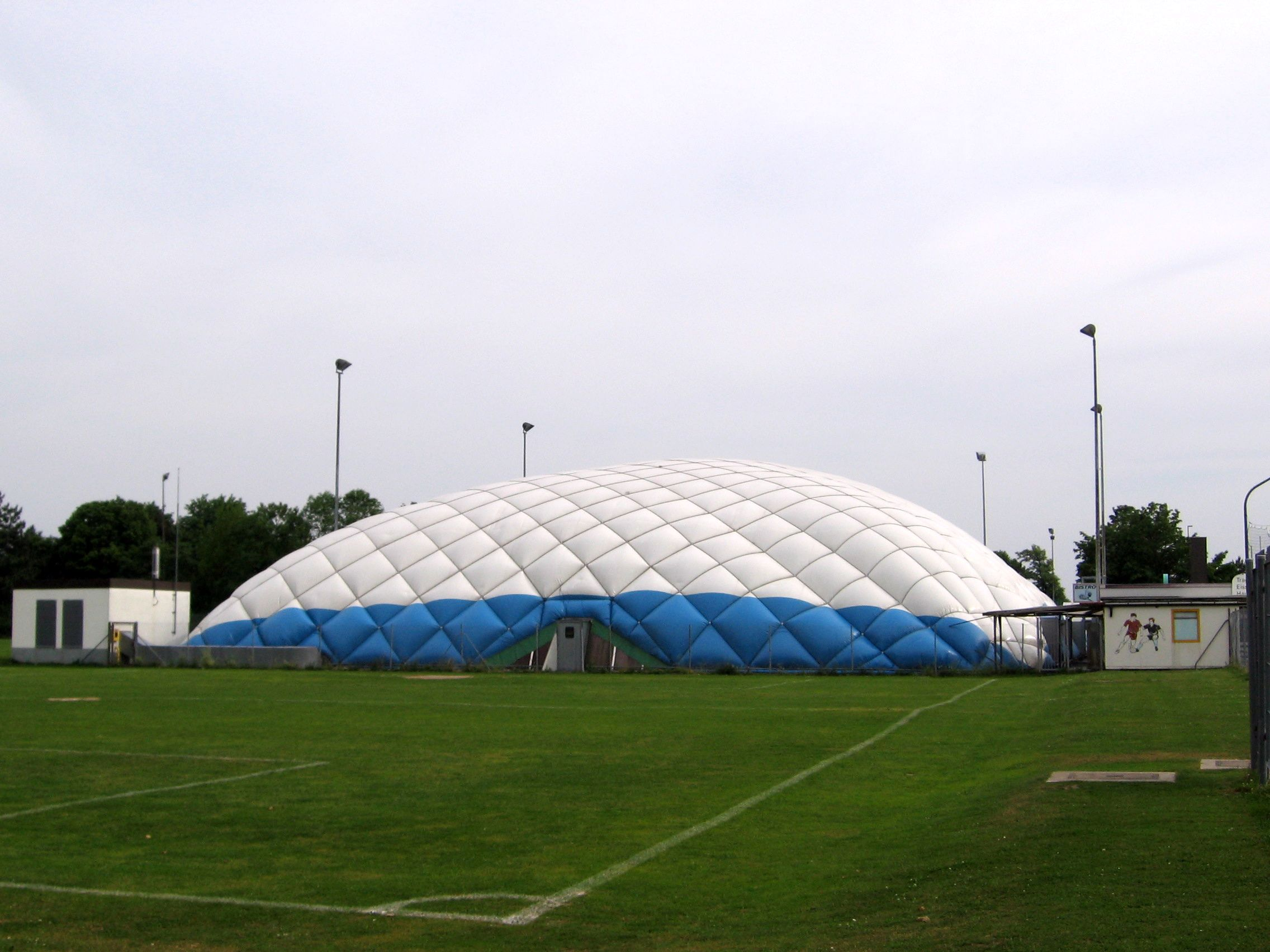 Zusehen ist die Eishalle in Haunstetten